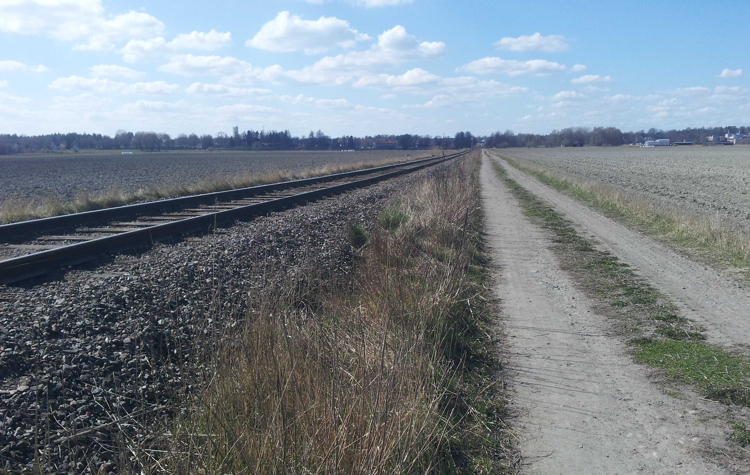 Järnvägslinjen Örbyhus–Hallstavik. Bild tagen i utkanten av Gimo.